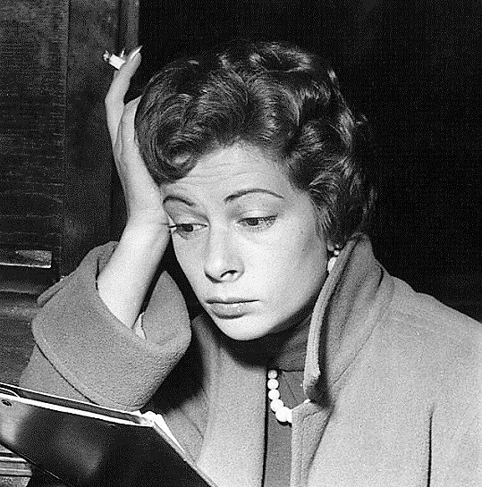 Flora Medini